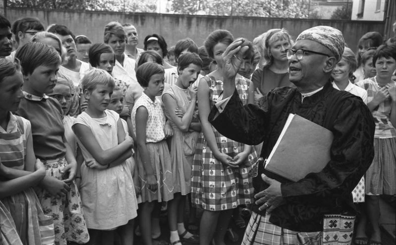 Birmanischer Erzieher, U Ba Lwin besichtigt die Klara Schumann Schule in Bonn